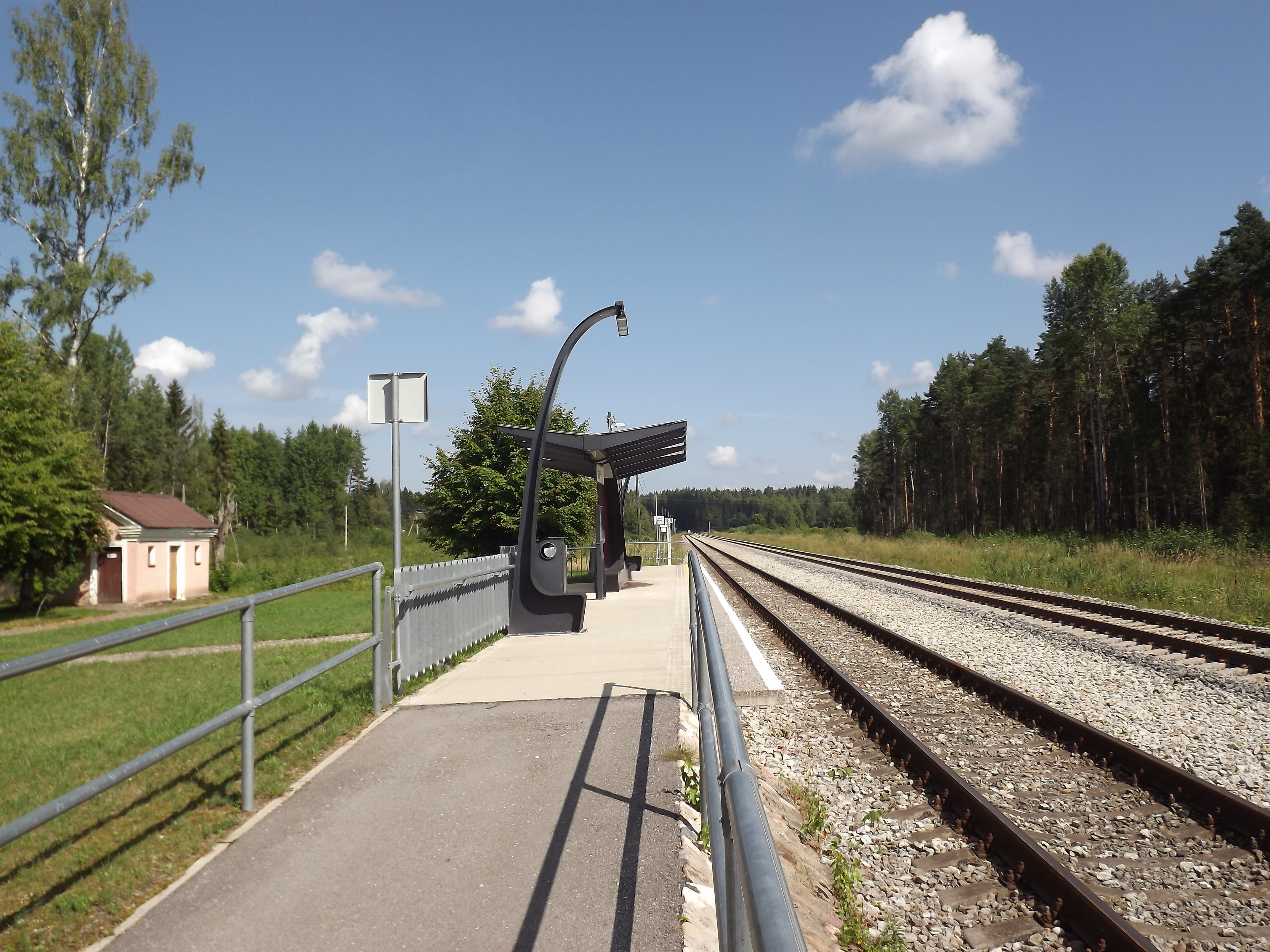 Keeni raudteejaama perroon